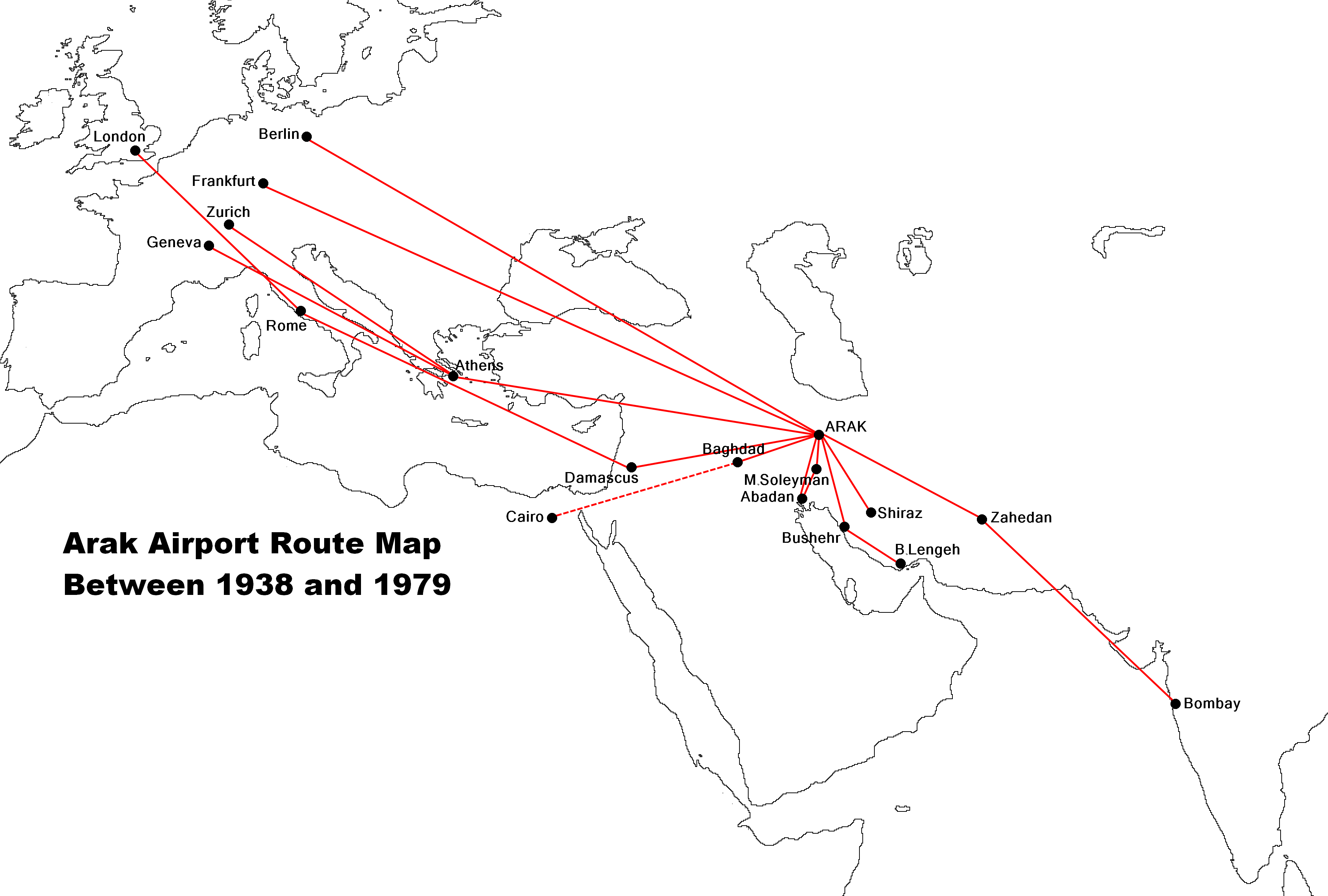 arak airport